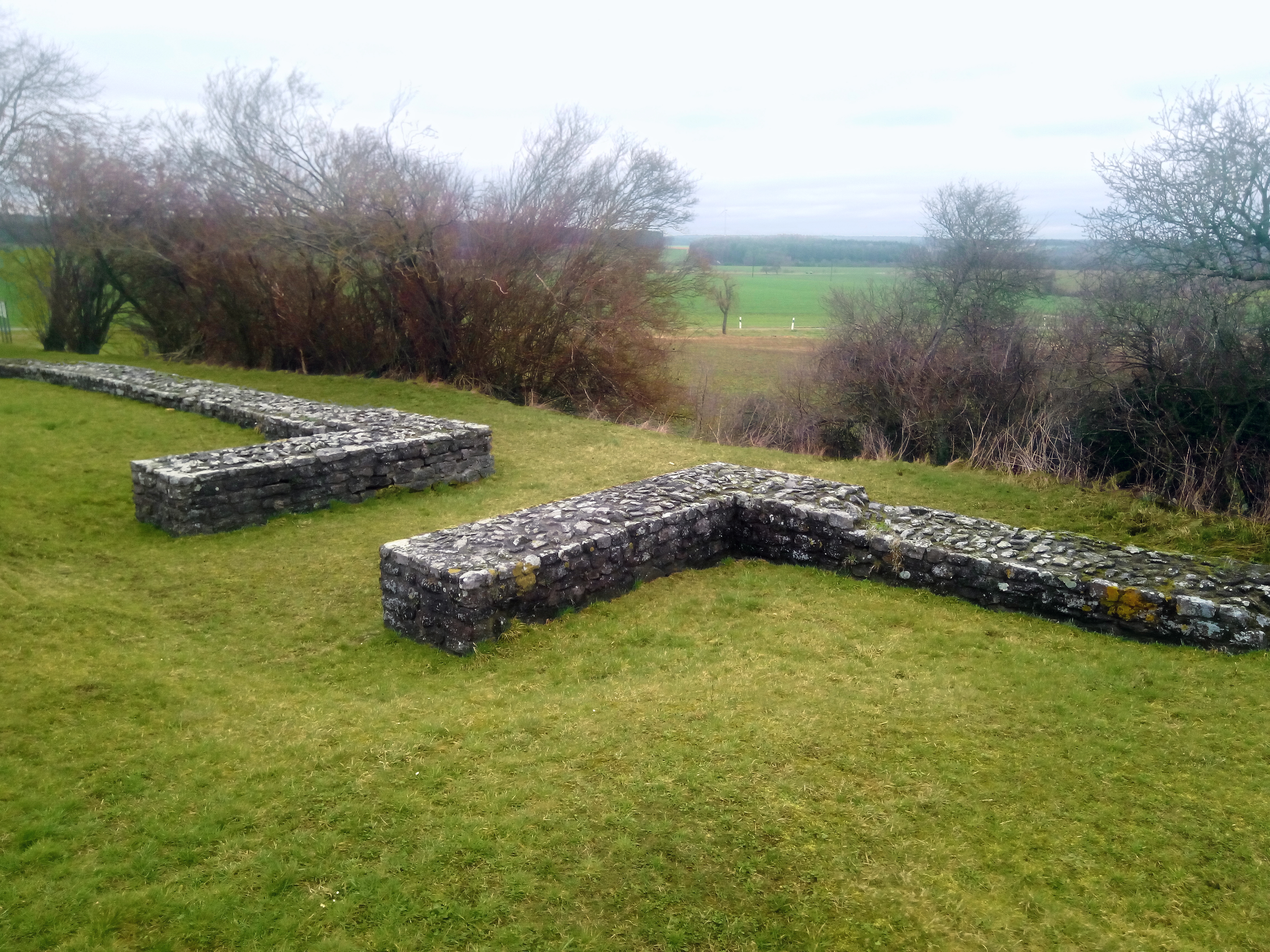 Rekonstruiertes Osttor des Kleinkastell Haselburg, Gerolzahn, 49.6334797, 9.3304911